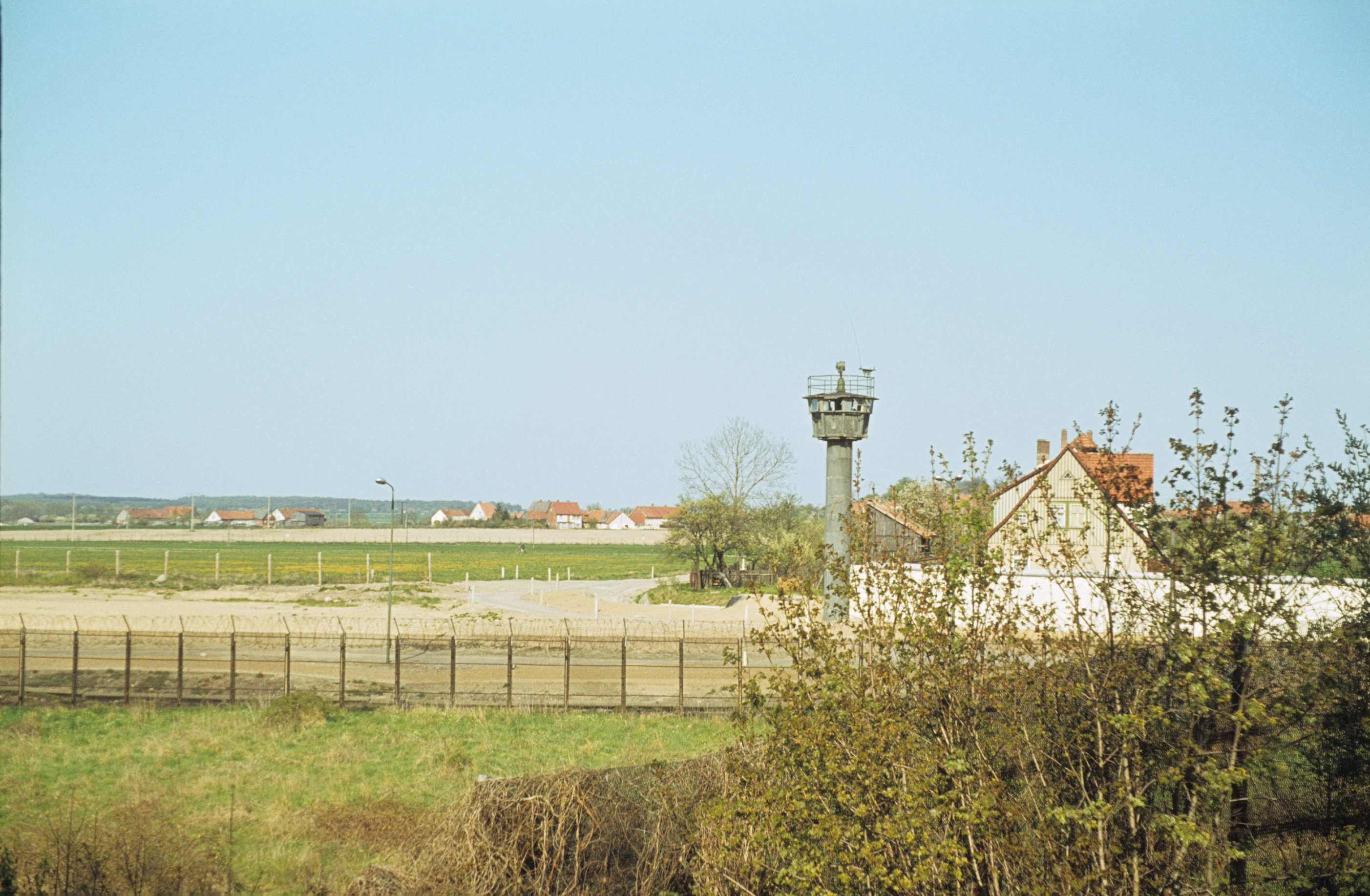 Innerdeutsche Grenze Ende der 70er Jahre im Bereich nördlicher Harz. Blick von Eckertal in Niedersachsen nach Stapelburg in der DDR